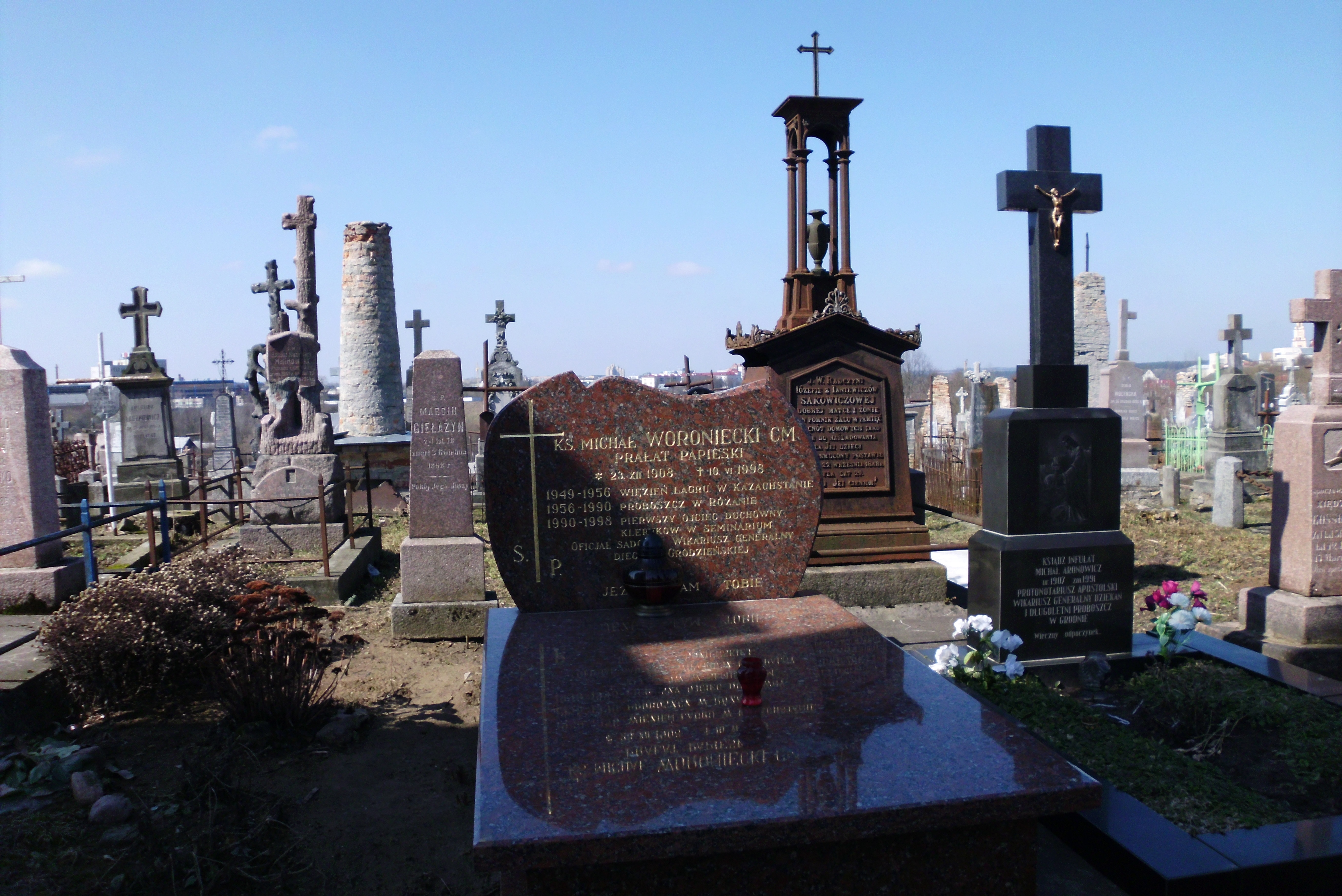 Kwiecień 2013